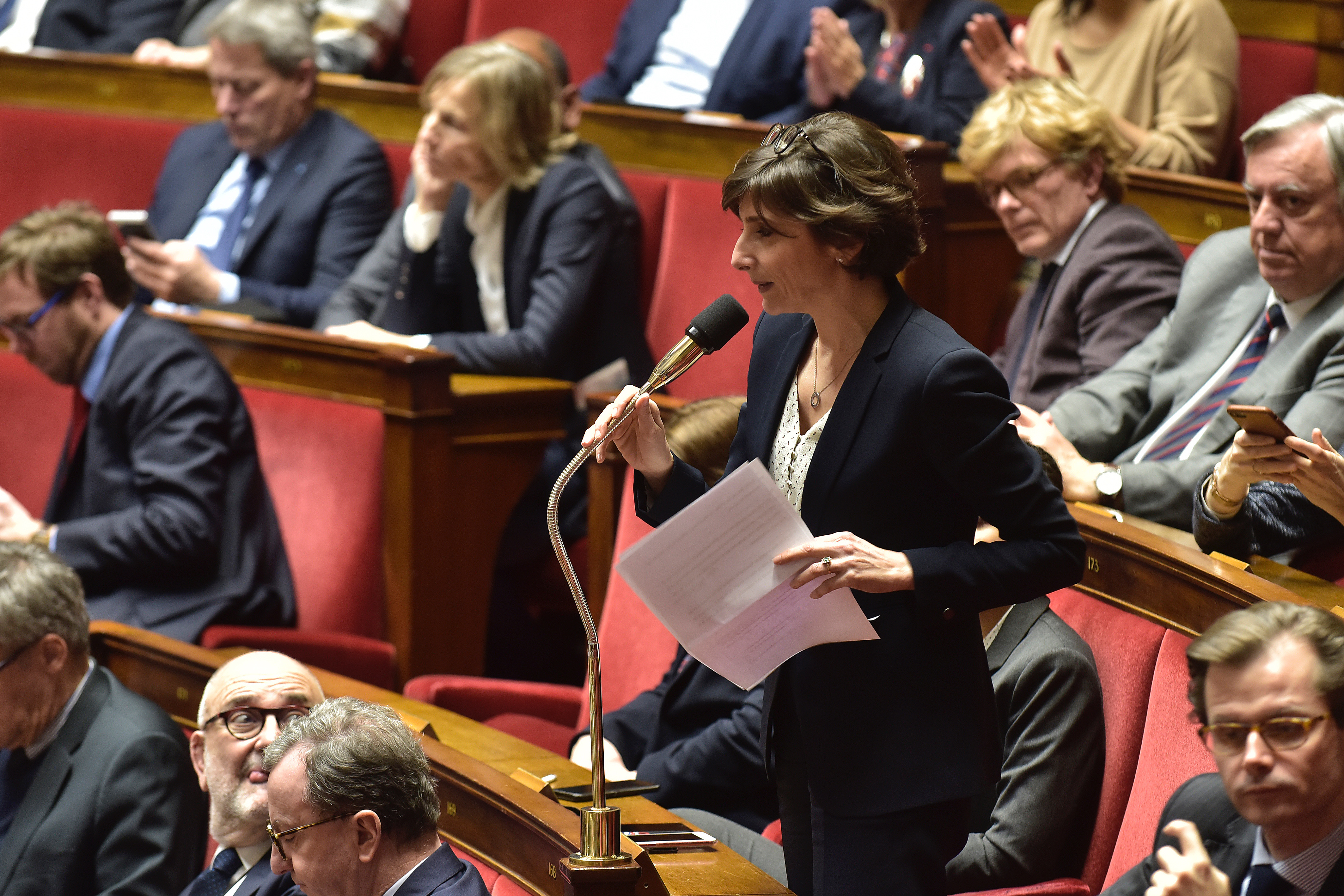 Photo of Nathalie Elimas, member of the French national assembly doing a speech